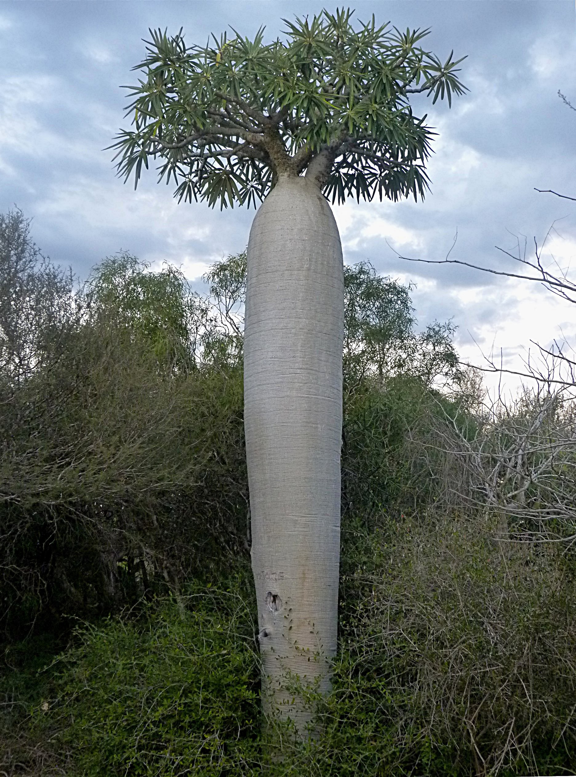 Arboretum d'Antsokay, Tuléar, Madagascar.